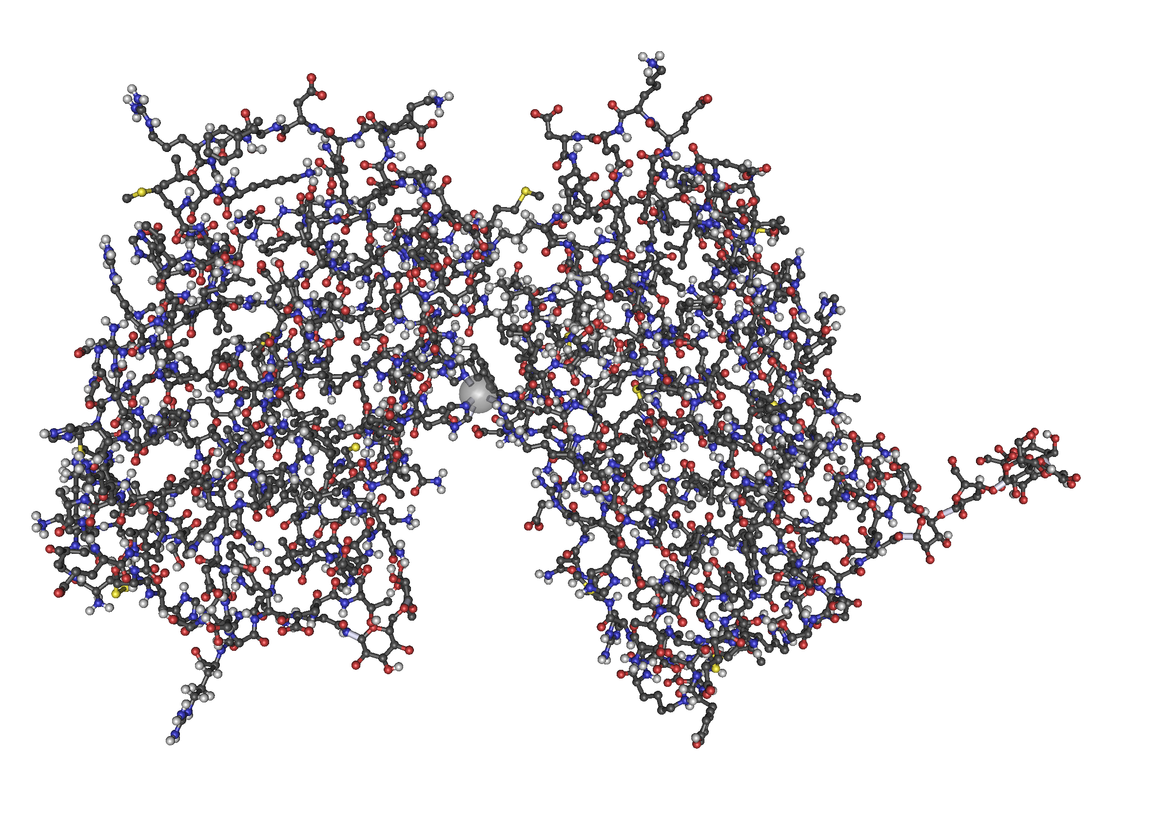 1AU1_Human_Interferon-Beta